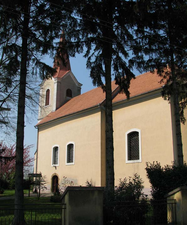 Crkva sv. Martina Šćitarjevo, Velika Gorica